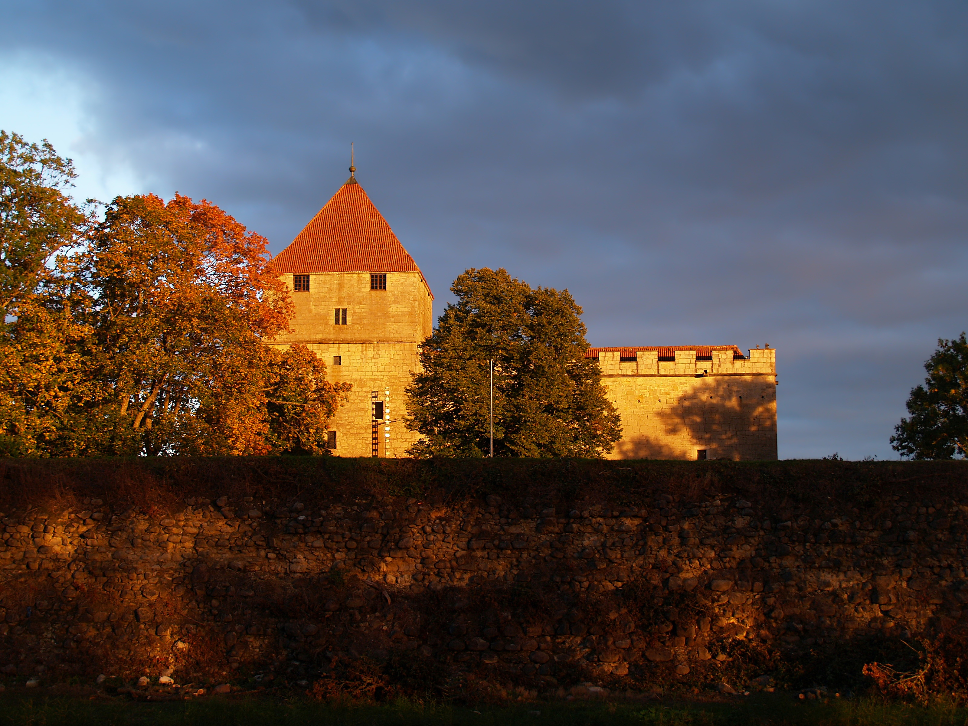 Kuressaare linnus